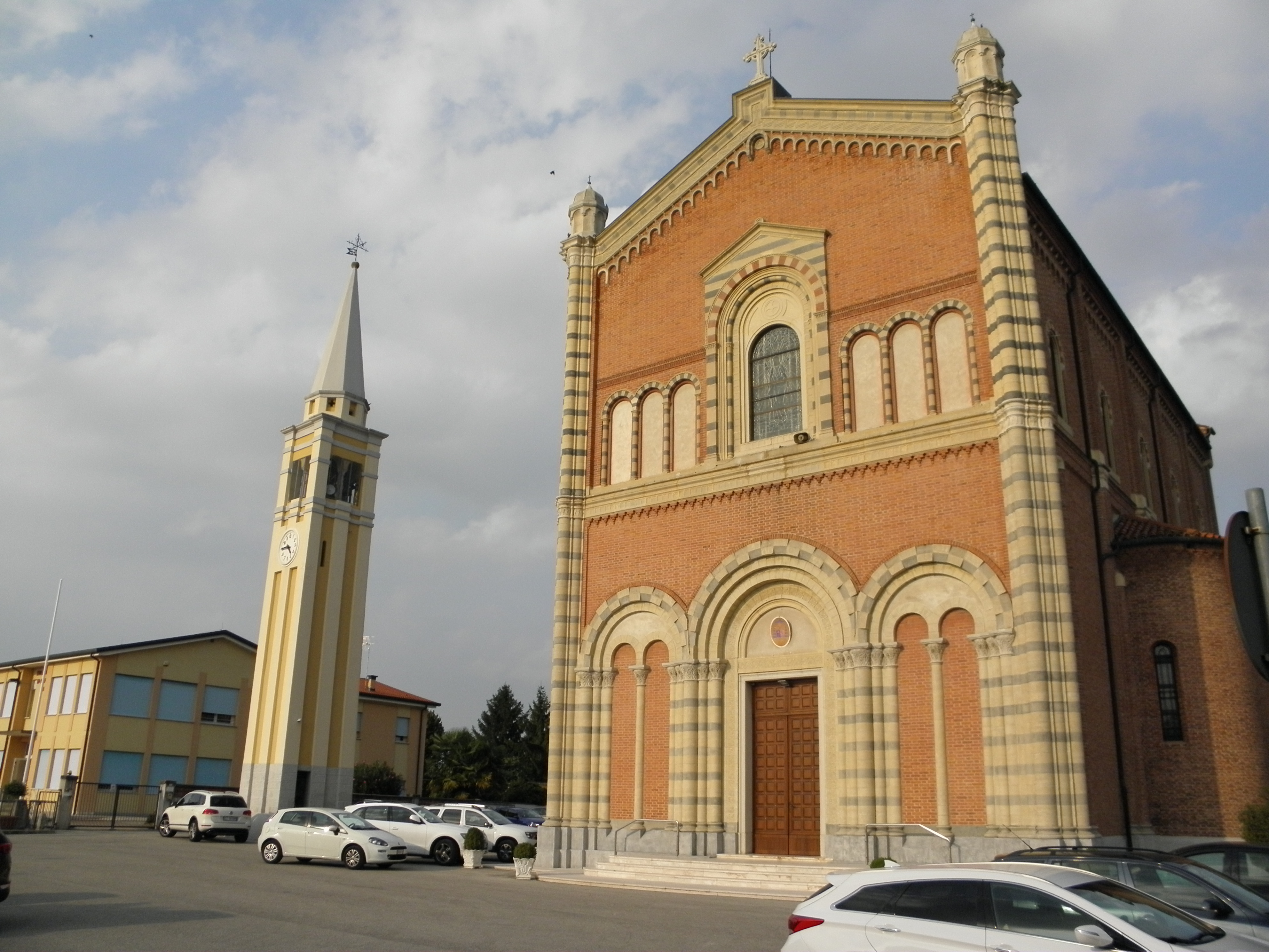 Loreggiola, frazione di Loreggia: la chiesa parrocchiale di Santa Maria Immacolata.